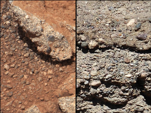 Марсианский и земной (справа) гравий